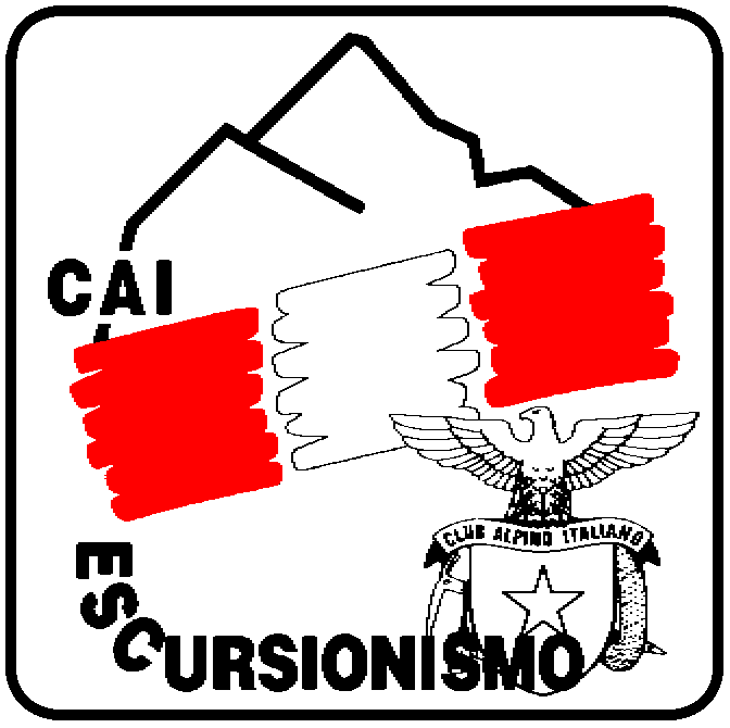 Stemma dell'escursionismo del Club Alpino Italiano